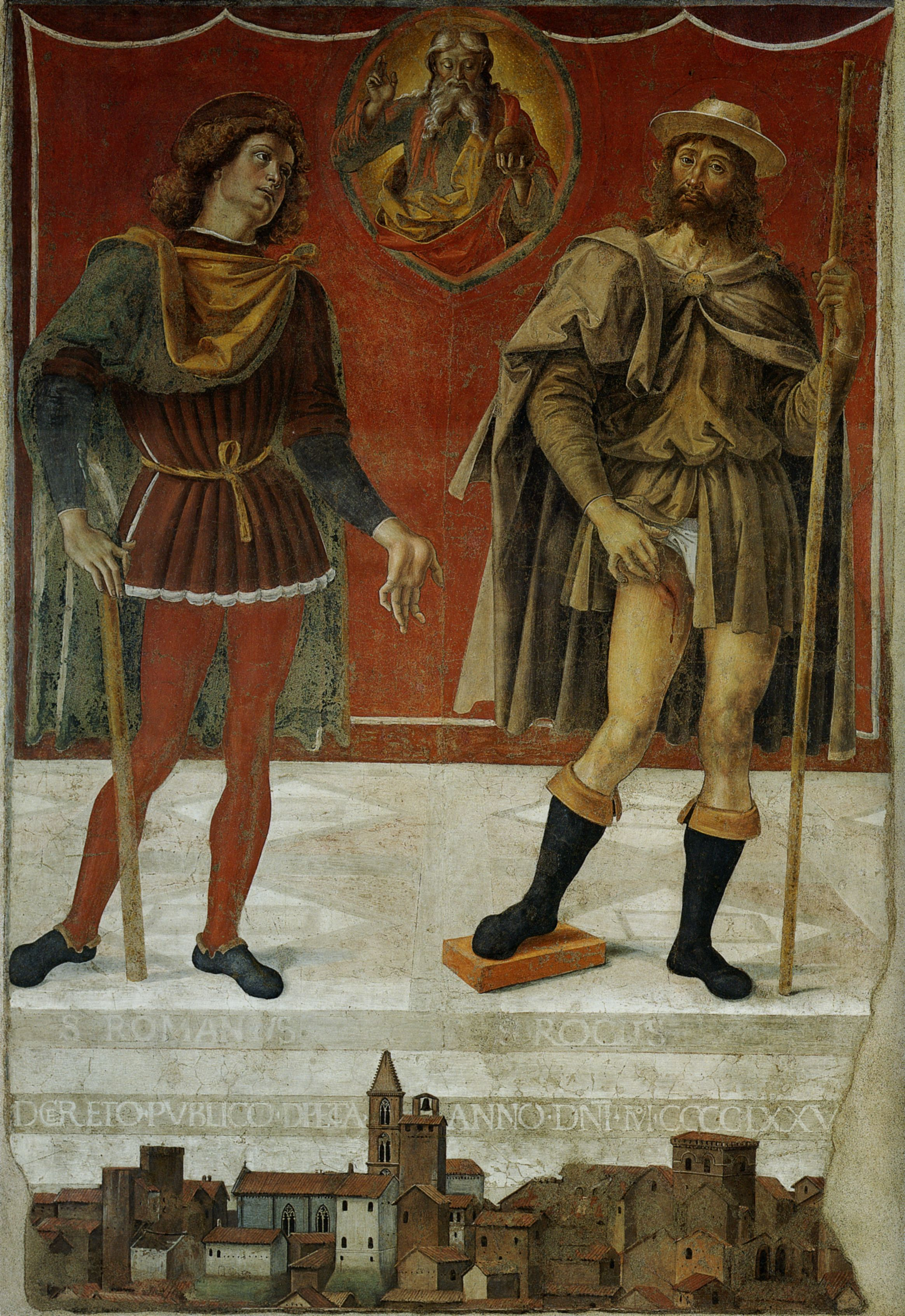 Pietro Perugino: I Santi Romaneo e Rocco con l’Eterno benedicente e veduta di Deruta. Cat. no. 10 in Vittoria Garibaldi: Perugino. Catalogo completo. Octavo, Firenze 2000, ISBN 88-8030-091-1